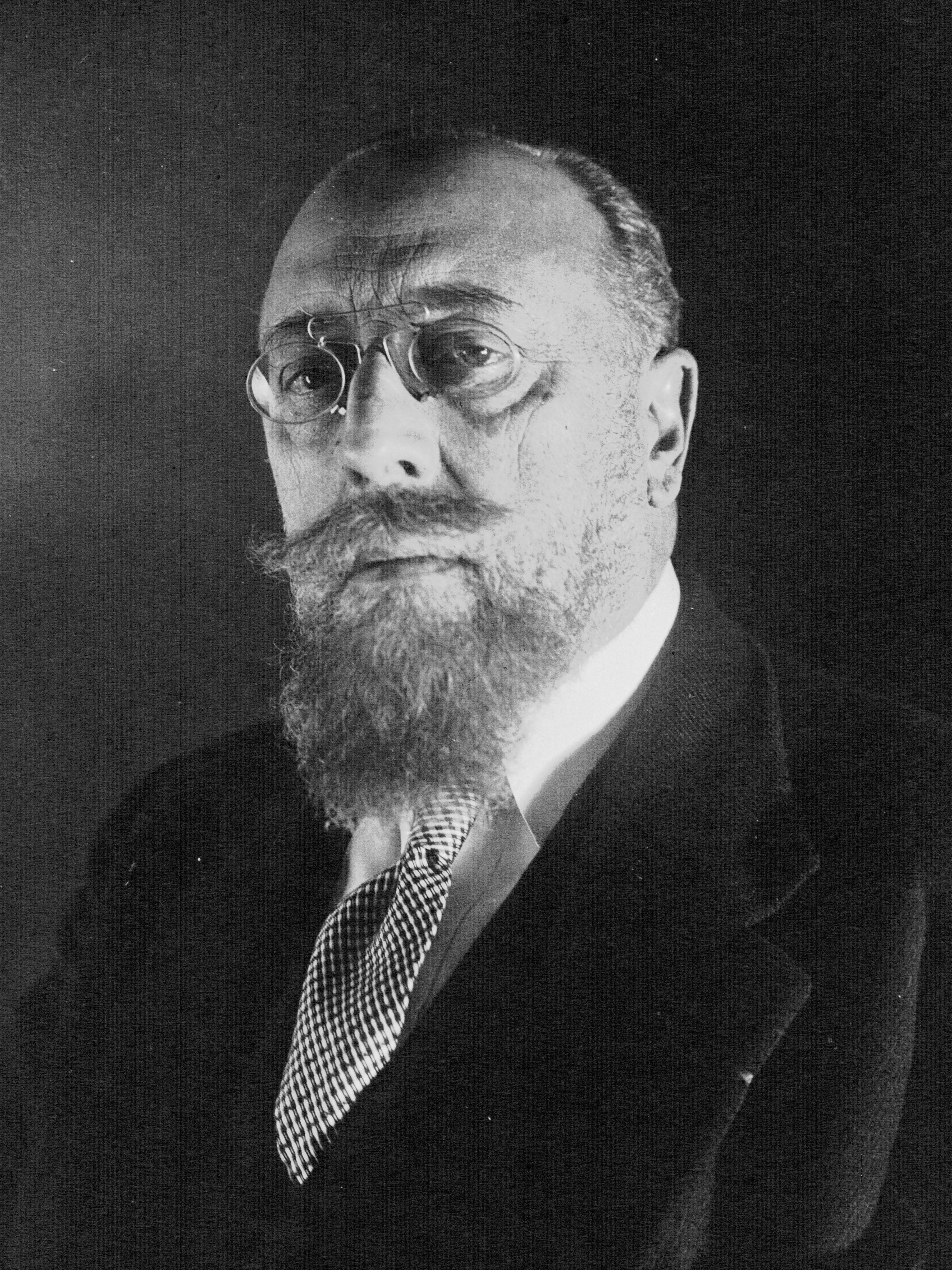 Charles Guernier, député de l'Ille et Vilaine [photographie de presse]